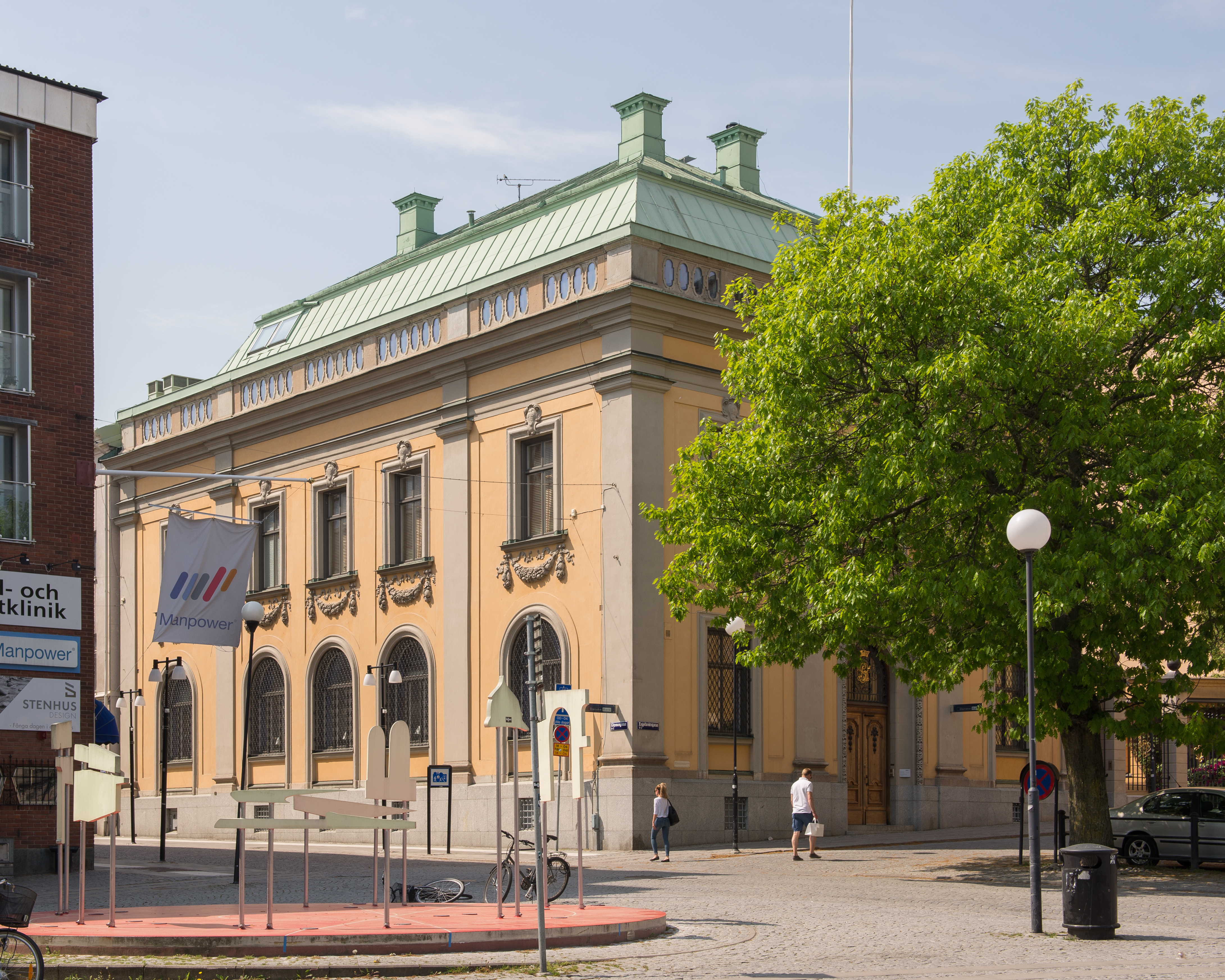 Fd. Riksbankshuset i Örebro (Rådhuset 2)